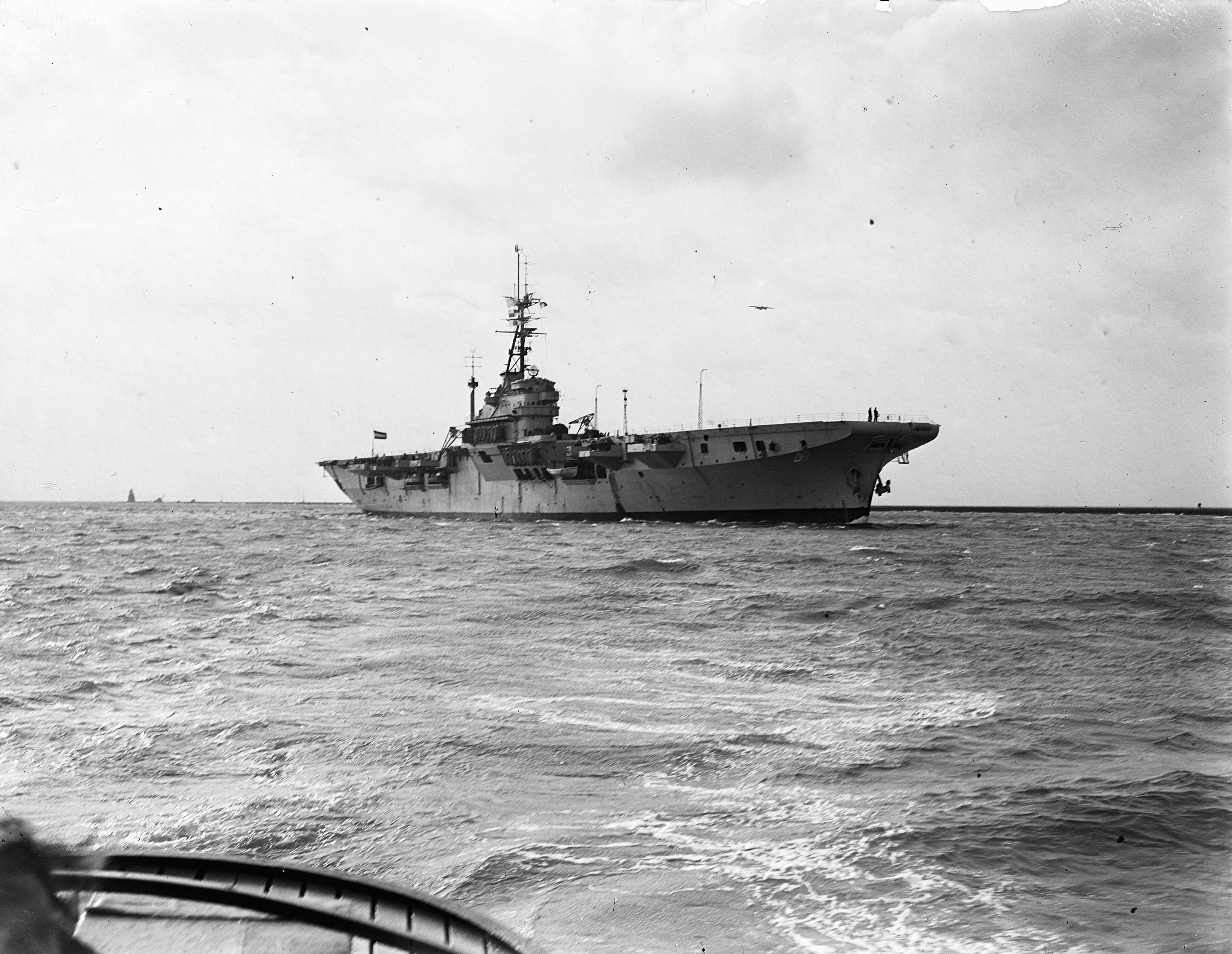 Collectie / Archief : Fotocollectie Anefo Reportage / Serie : [ onbekend ] Beschrijving : Karel Doorman te Hoek van Holland Datum : 3 juni 1948 Locatie : Hoek van Holland Trefwoorden : schepen Fotograaf : Oorschot, […] van / Anefo Auteursrechthebbende : Nationaal Archief Materiaalsoort : Glasnegatief Nummer archiefinventaris : bekijk toegang 2.24.01.09 Bestanddeelnummer : 902-7787